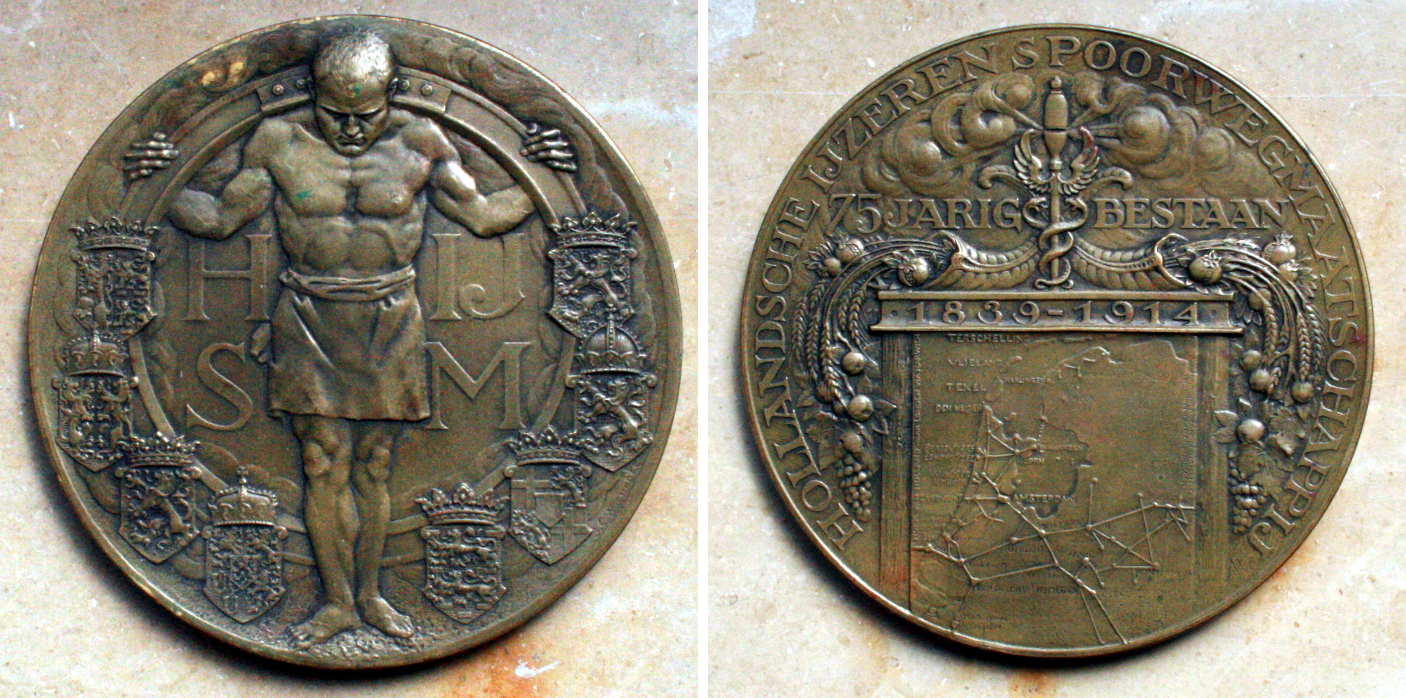 Medaille zur Erinnerung an das 75jährige Bestehen der Hollandsche Ijzeren Spoorwegenmaatschappij (Niederländische Eisenbahnen)(1839-1914)